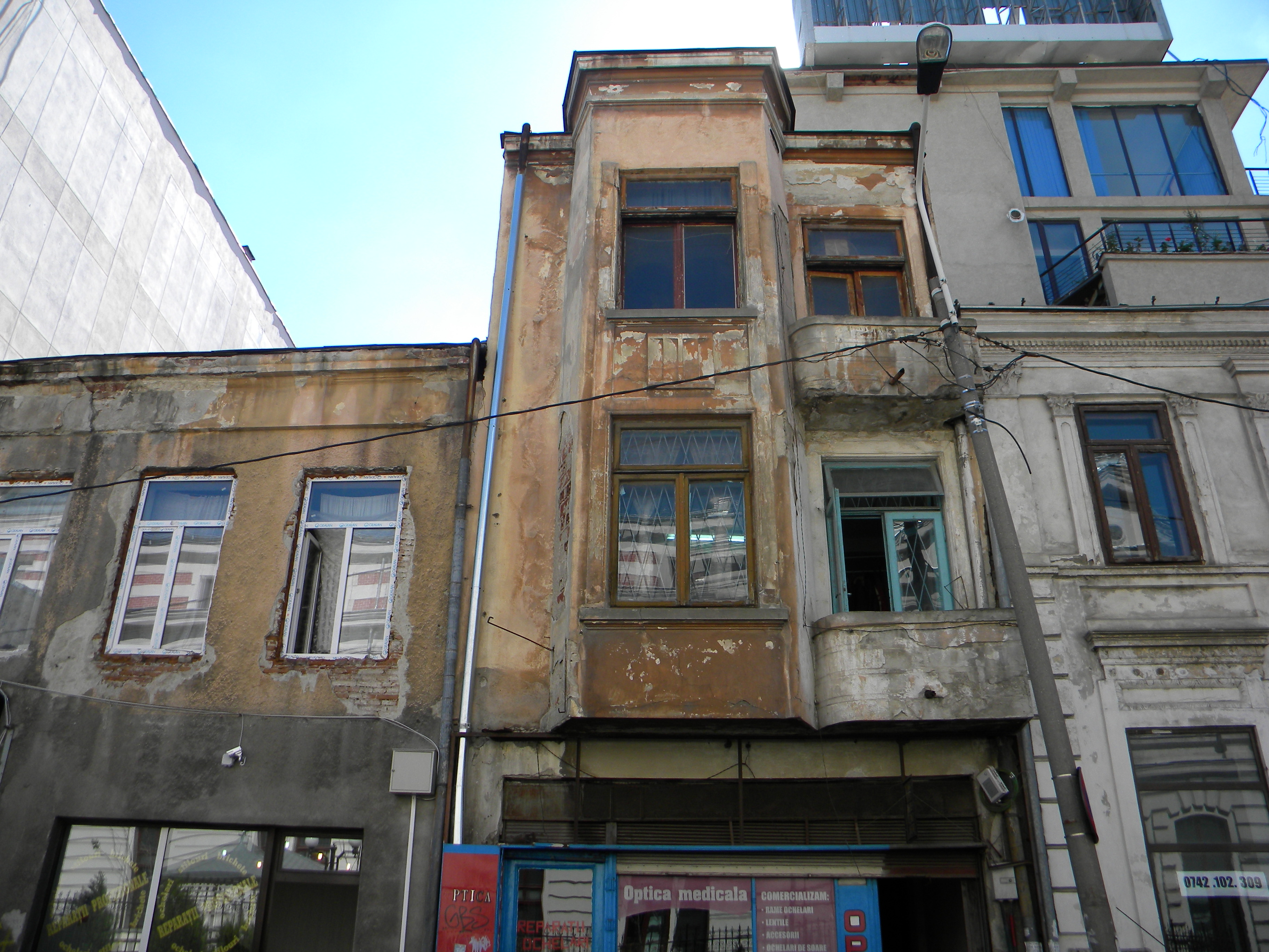 Bucuresti, Romania, Casa pe Str. Coltei nr. 4, sector 3